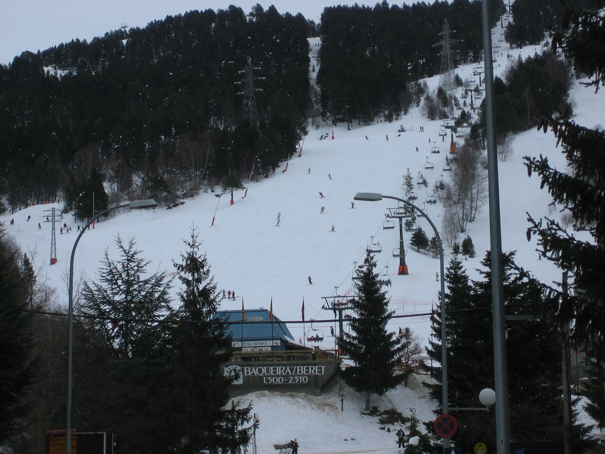 Vista de la Estación de esquí Baqueira-Beret a 1.500 m